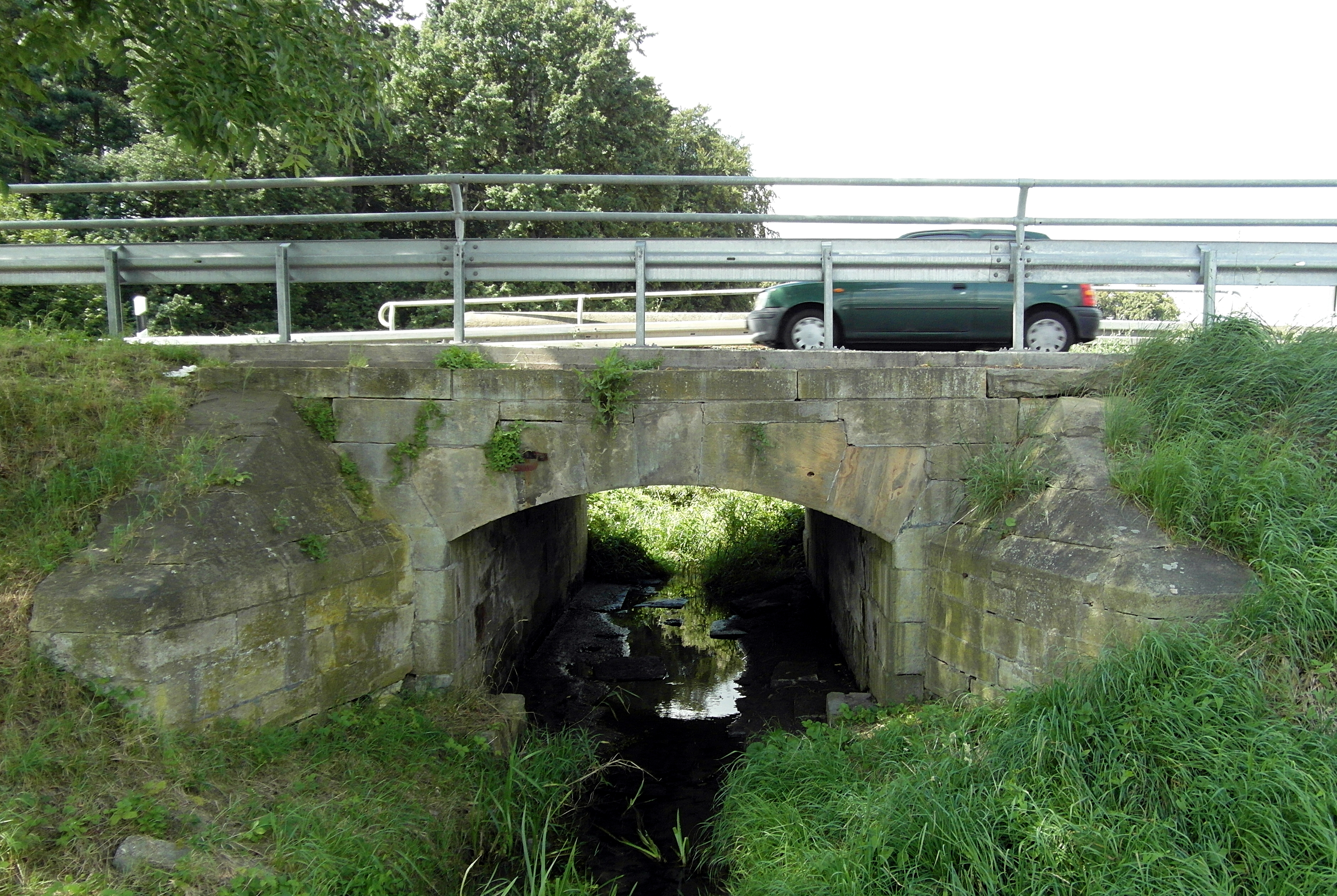 Die Brücke der Landesstraße 401 über die Haferriede bei Ditterke gilt als Baudenkmal. Foto vom Radweg-Stub an der L401.